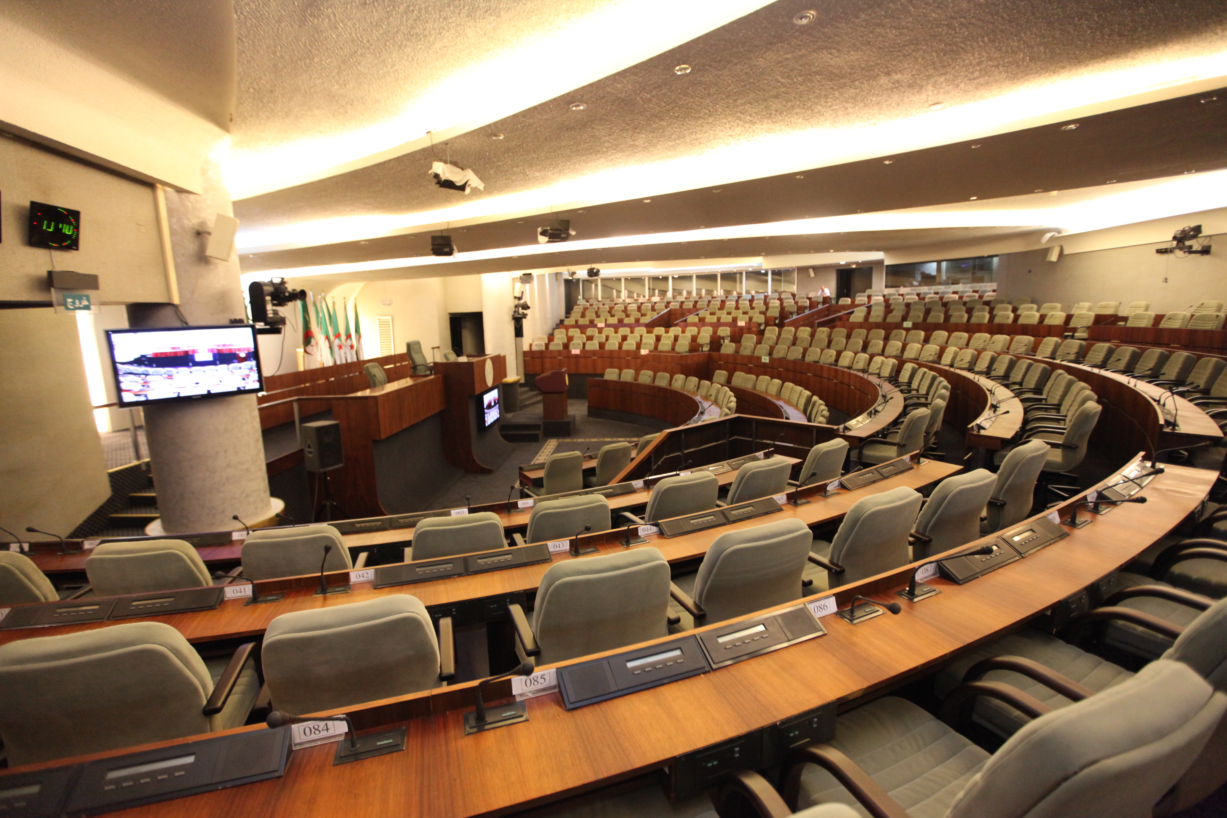 The APN returns with the 7th legislature, though protests continue over May 10th election results. عودة المجلس الشعبي الوطني في الفترة التشريعية السابعة رغم تواصل الاحتجاجات على نتائج انتخابات 10 مايو. L'APN donne le coup d'envoi de sa 7ème législature, tandis que les récriminations continuent concernant les résultats des élections du 10 mai.